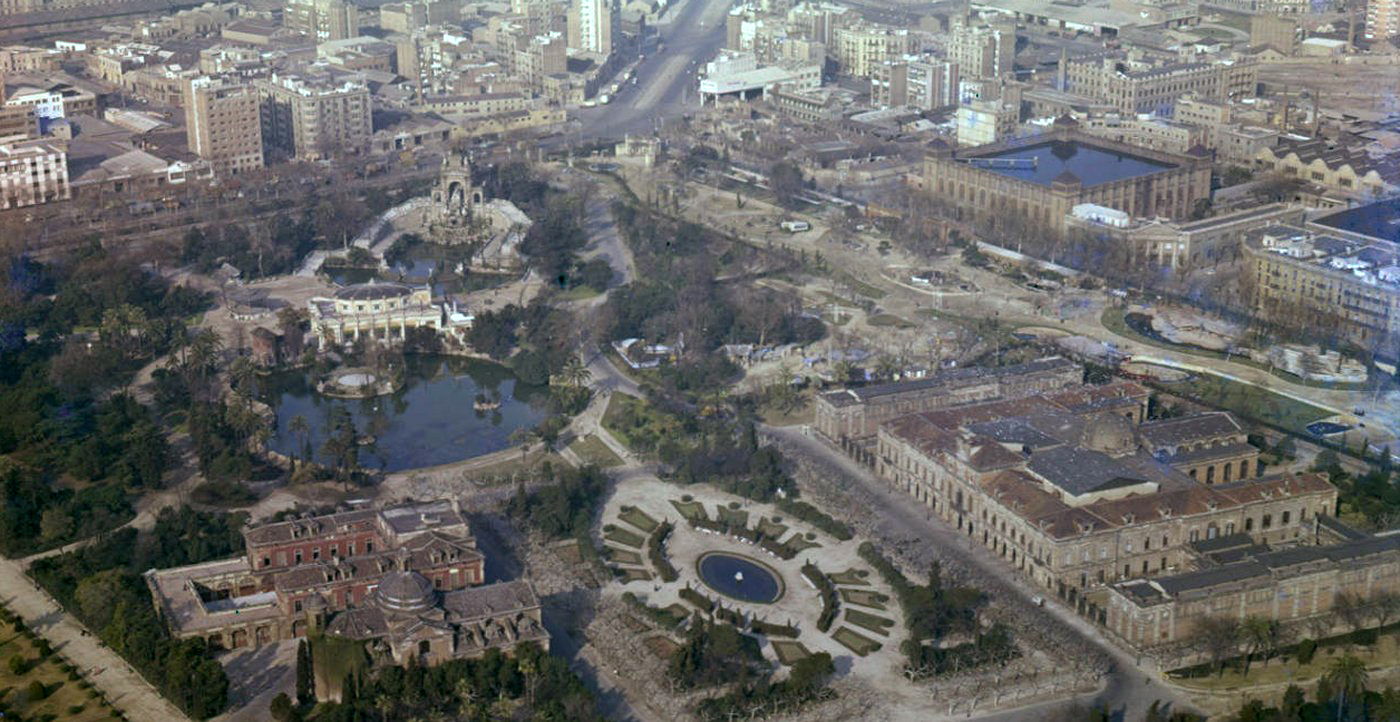 Vista aérea del Parque de la Ciudadela (1961).